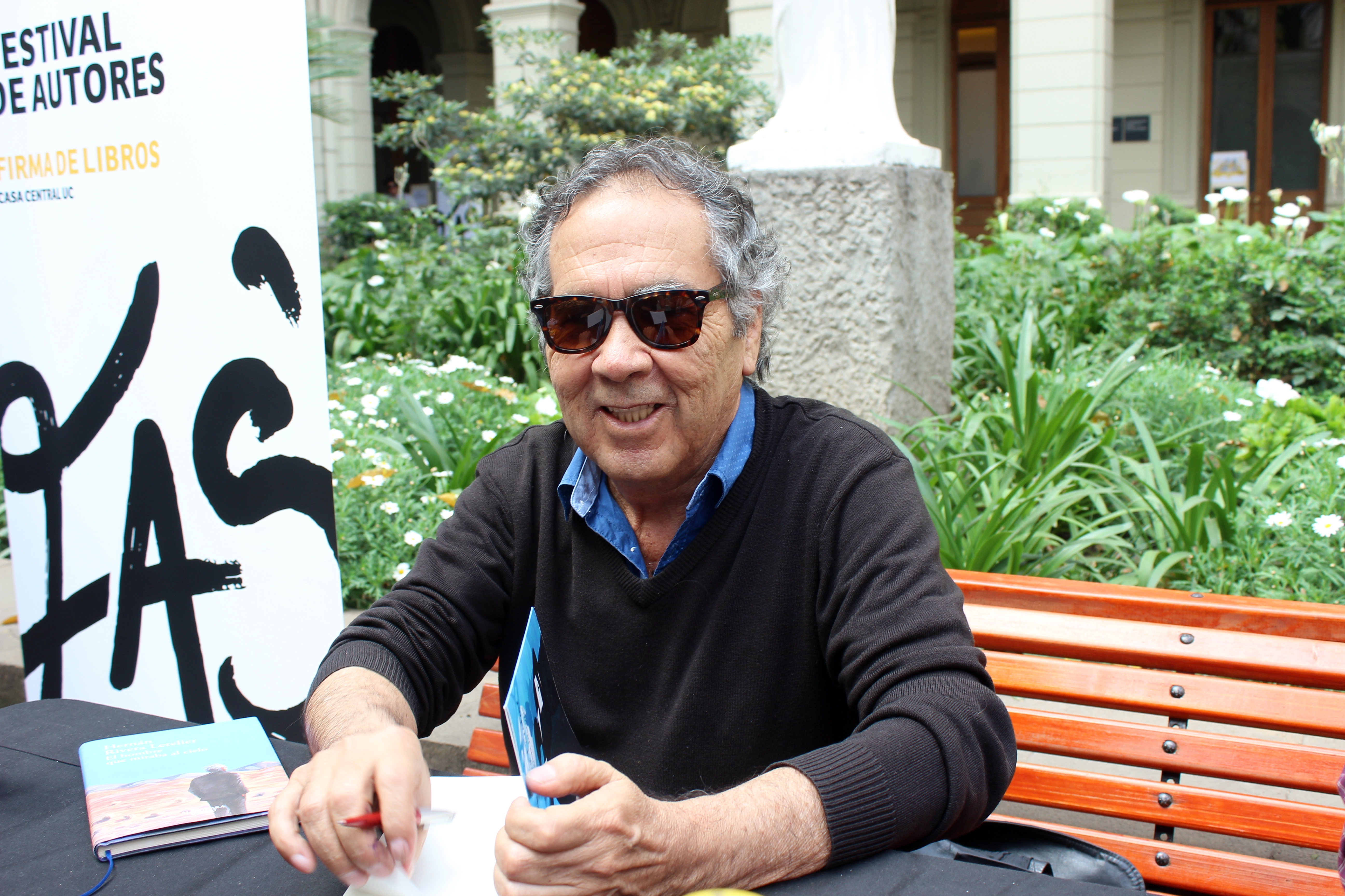 El escritor chileno Hernán Rivera Letelier durante una sesión de firma de libros en la primera etapa del Festival de Autores de Santiago 2018 realizada en la Casa Central de la Pontificia Universidad Católica de Chile.